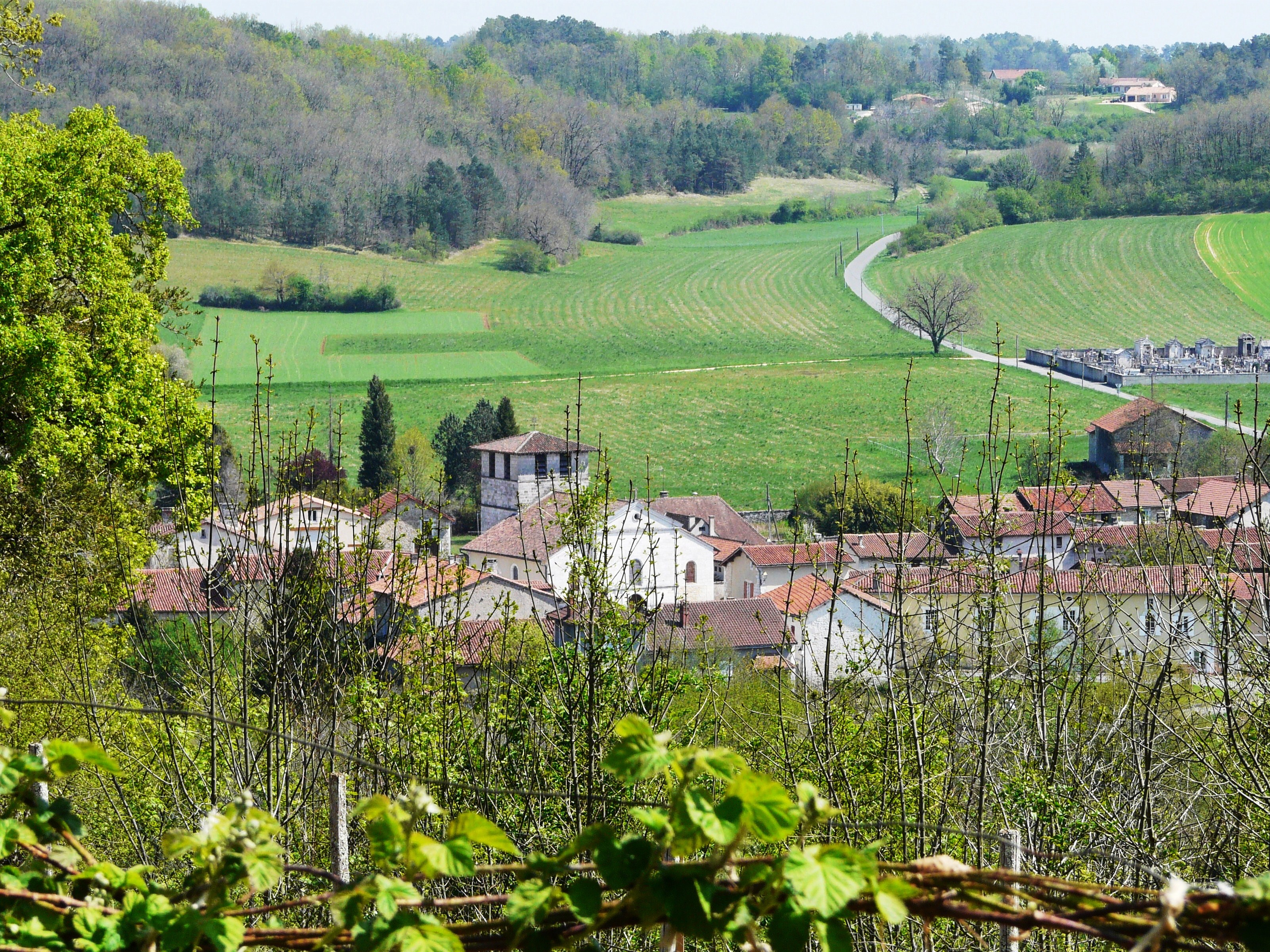 Le bourg de Quinsac, Dordogne, France